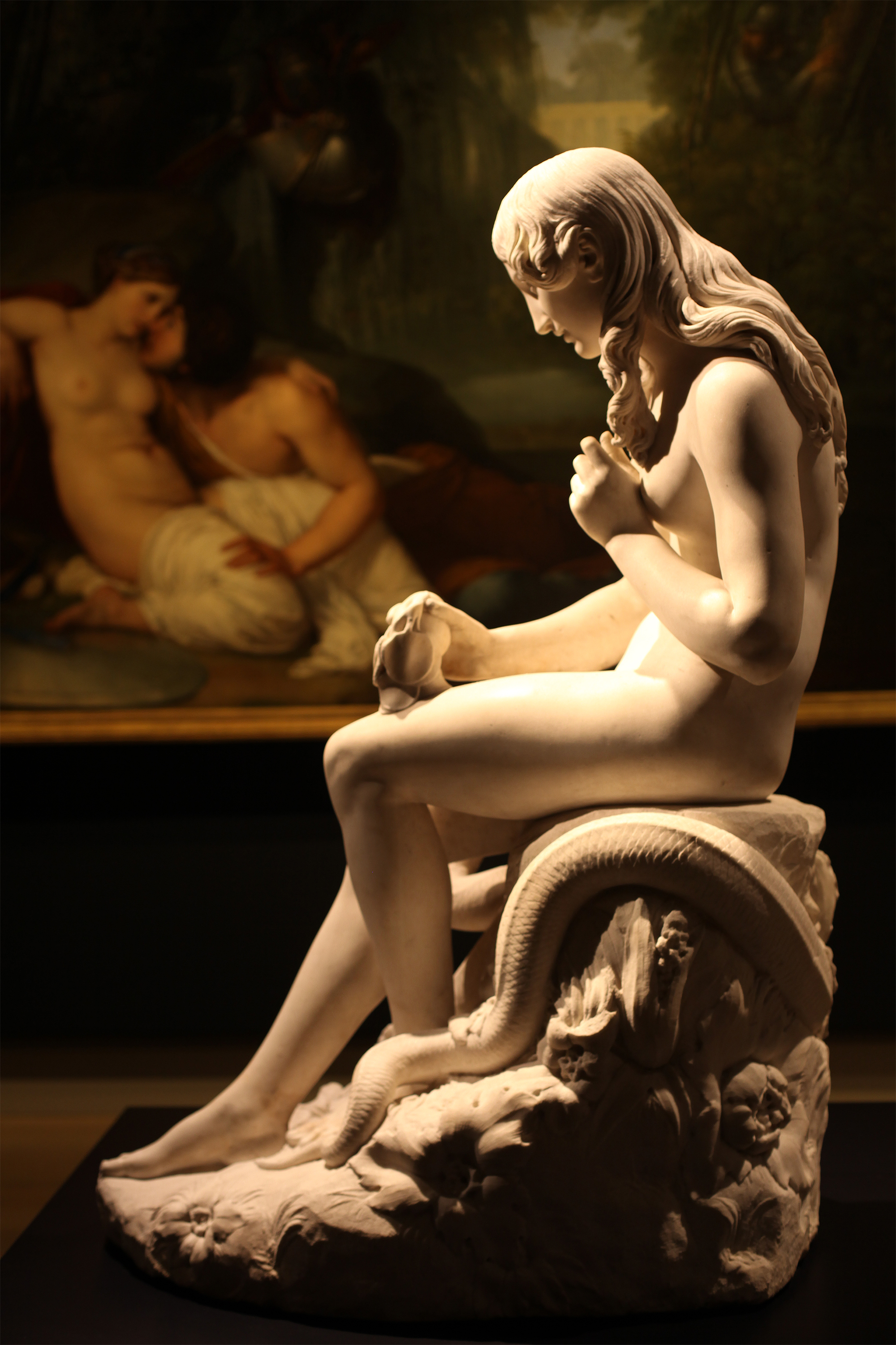 Innocenzo Fraccaroli (1805-1881) Eva prima del peccato (1842) vista laterale sinistra; fotografata alle Galleria d'Italia si Milano nella mostra "Romanticismo", novembre 2018